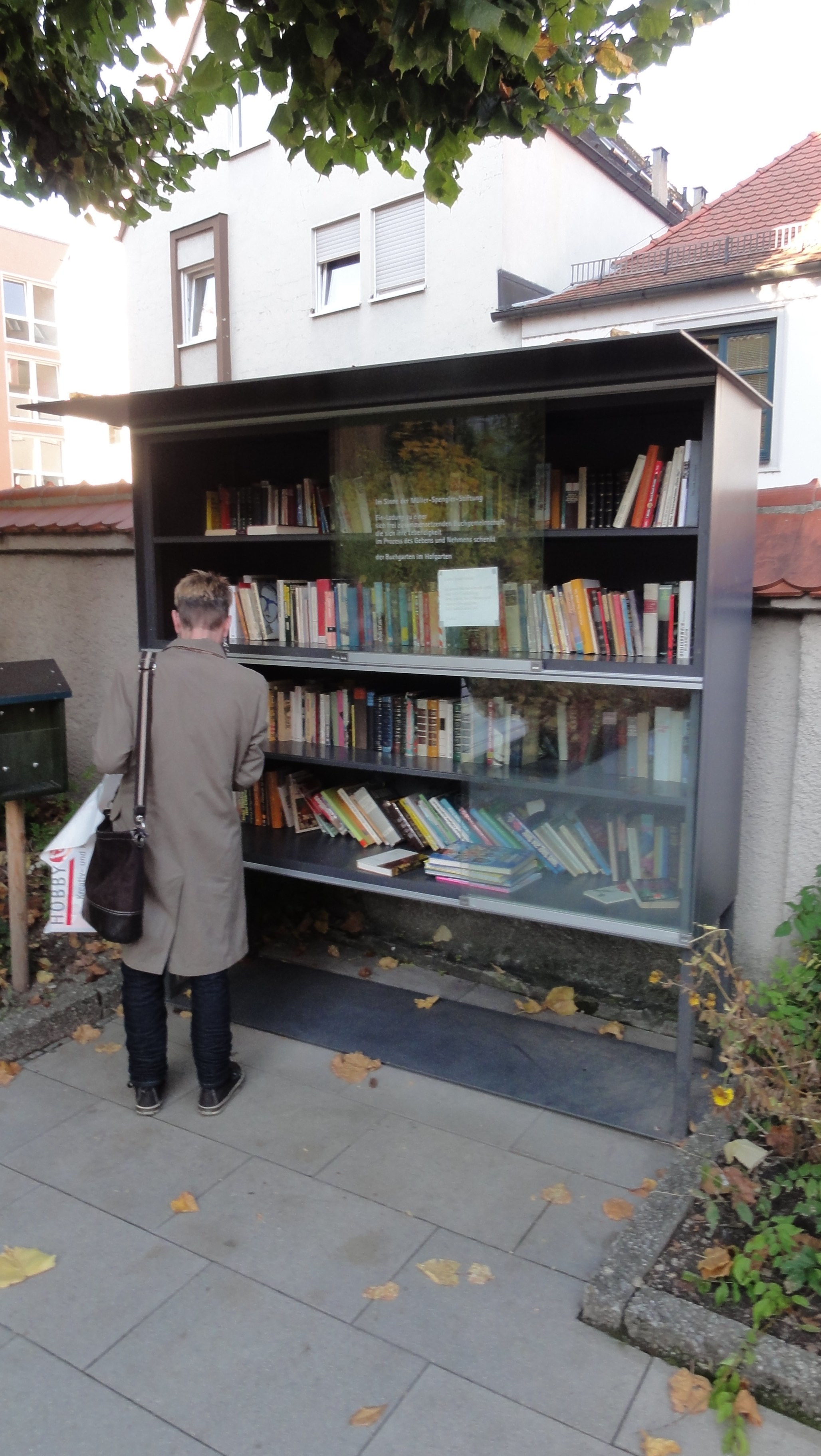 Augsburg, Germany